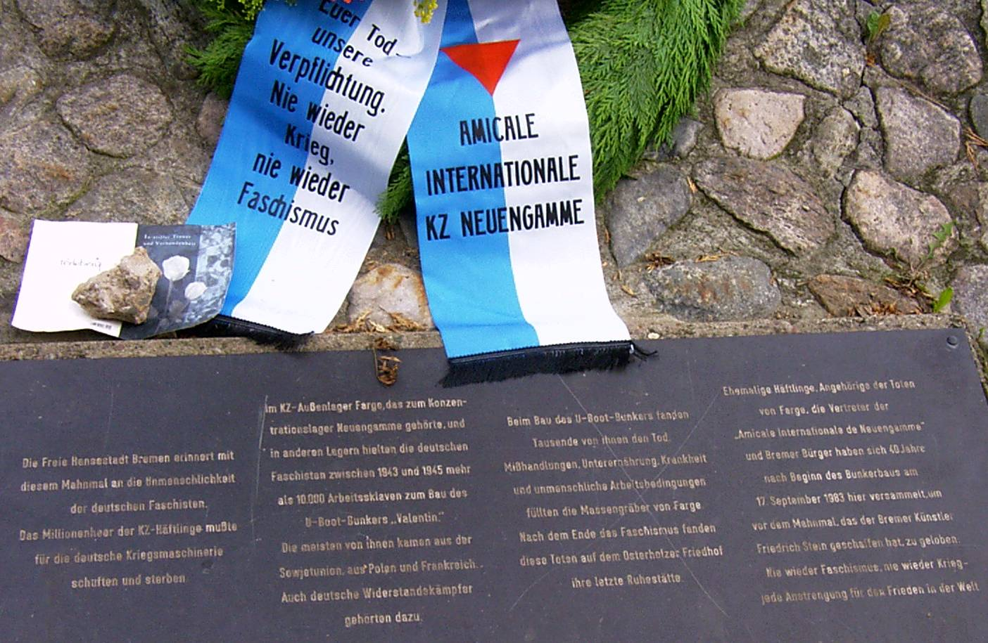 Mahnmal vor dem Bunker Valentin in Bremen-Farge - Kränze und Inschrift